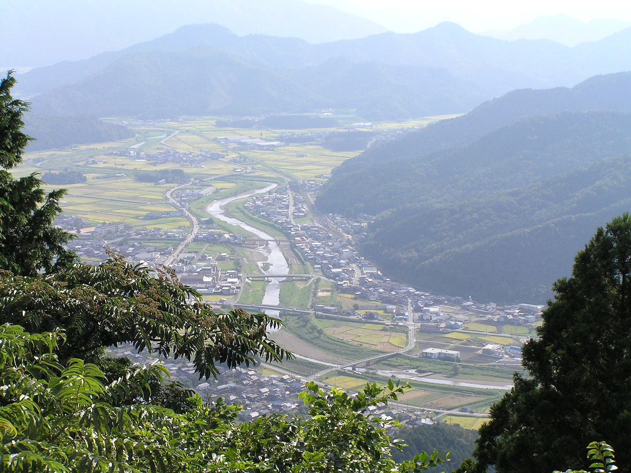 P9019204市島俯瞰・高谷山より